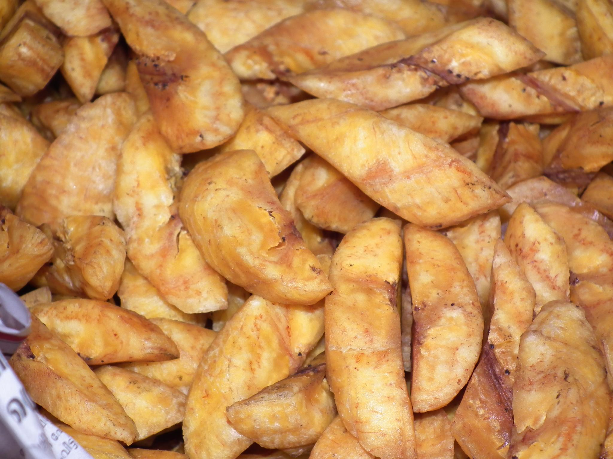 Kerala (Sharkara puraty) snack ready to mix